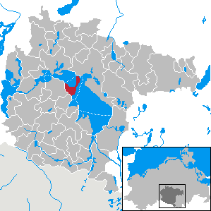 Klink im Landkreis Müritz, Mecklenburg-Vorpommern